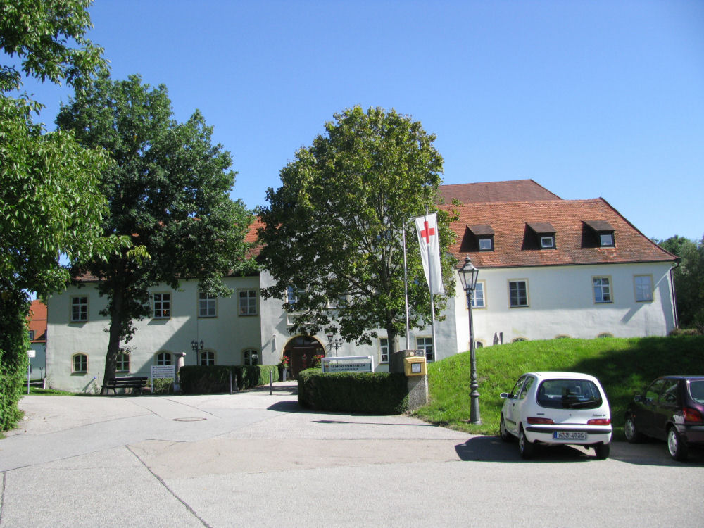 Schloss, gegliederte Mehrflügelanlage, mittelalterliche Weiherhausanlage, 15. Jahrhundert, Umbauten 16.-18. Jahrhundert; Ostflügel, dreigeschossiger Halbwalmdachbau mit Eckverstärkungen; Westflügel, ehem. Torbau, zweigeschossiger Walmdachbau mit Zwerchhäusern und Schweifgiebel; Südflügel, zweigeschossiger Walmdachbau über unregelmäßigem Grundriss; Nordflügel, dreigeschossiger Walmdachbau; Reste der Zwingermauer mit vier runden Türmen, Bruchstein, 1432.